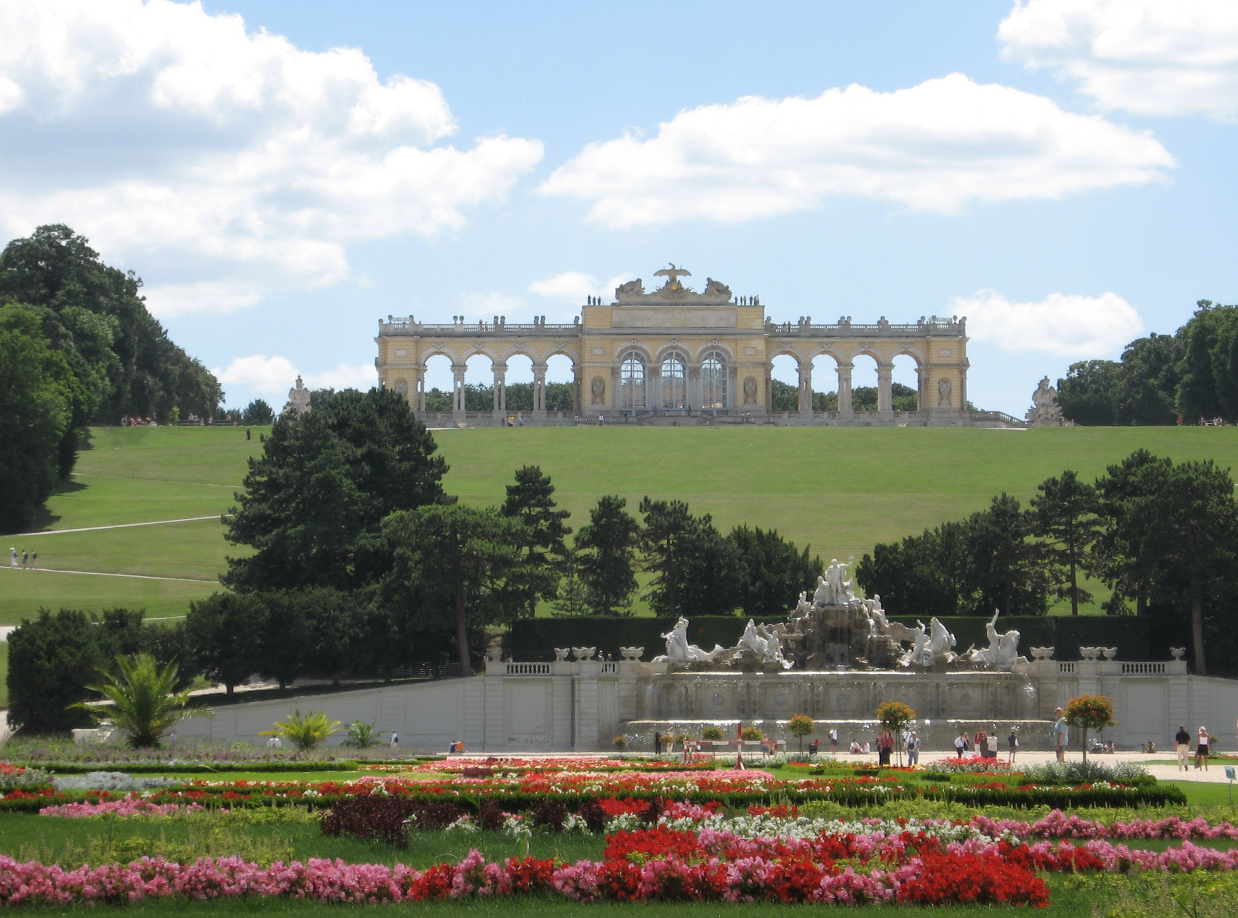 The Gloriette at Schloss Schönbrunn in Vienna, Austria